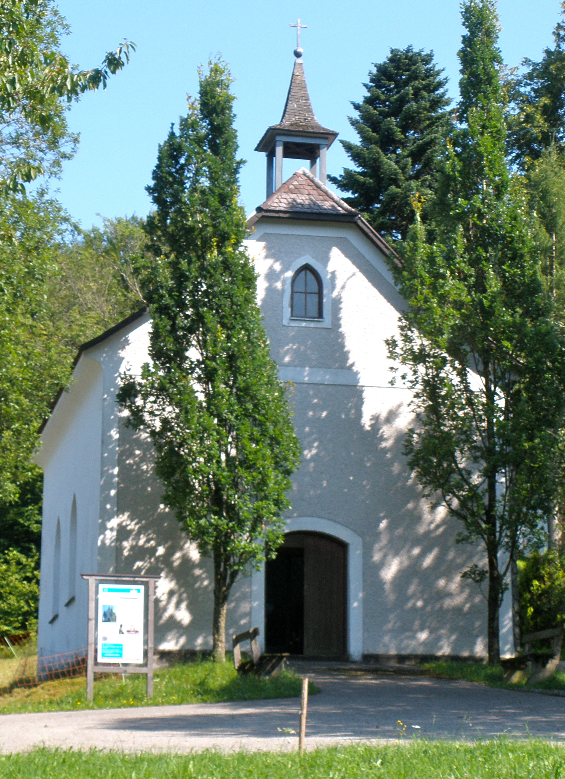 Die Kalvarienbergkapelle in Neukirchen bei Altmünster wurde am 6. August 1882 eingeweiht.